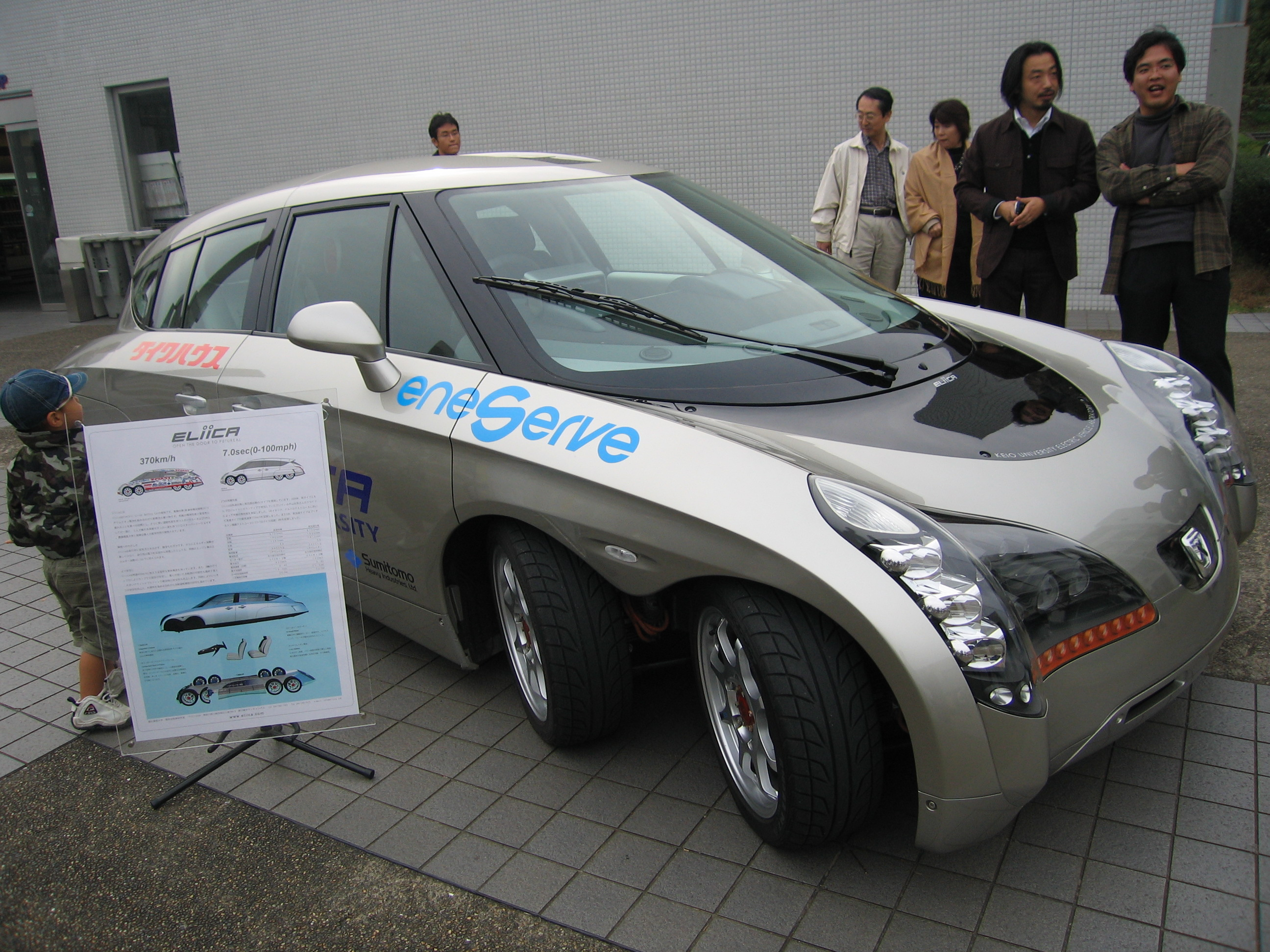 電気自動車エリーカ(Eliica) Electric Vehicle Eliica